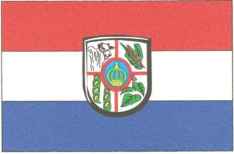 Bandeira da cidade de Cícero Dantas, estado da Bahia.